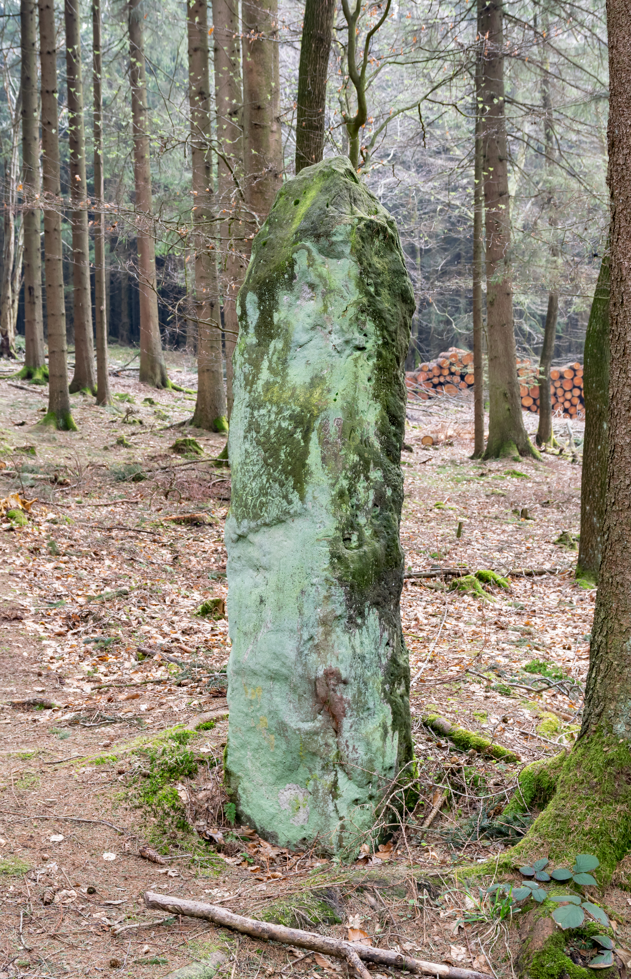 Die sogenannte "Bülheimer Großmutter", ein als Grenzstein umgenutzter Menhir im Wald bei Lichtenau-Kleinenberg.